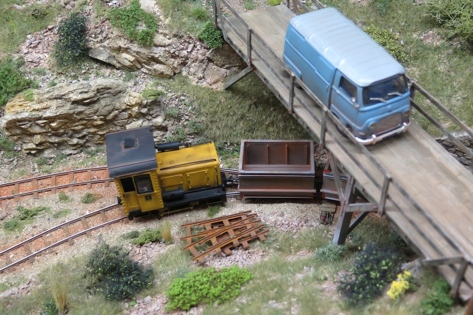 Detail der Feldbahn-Anlage Ste Trinca-Vecnou in der Spur 0-14 im für die Modellautos typischen Massstab 1:43. Diese Modelleisenbahnanlage wurde unter anderem an der 35. Expo-Trains Luxembourg in Walferdange im Grossherzogtum Luxemburg am 7. und 8. November 2015 ausgestellt. Von dieser Ausstellung stammt auch das Foto.